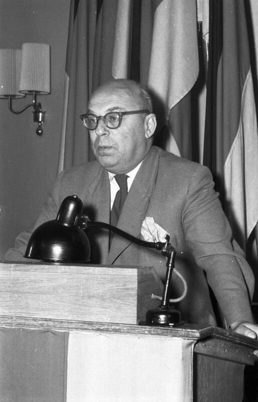 Berlin, Pressekonferenz, Friedrich Karl Kaul ADN-ZB, 31.8.1956, Bildmaterial zur Pressekonferenz des Ausschusses für Deutsche Einheit am 31.8.1956 Am 31.8.1956 führte der Ausschuss für deutsche Einheit im Steinsaal des Hauses des Nationalrates eine internationale Pressekonferenz durch, auf welcher die Pressevertreter der KPD, Dr. Kaul, und Prof. Dr. Krüger über die rechtswidrige Anklage und die rechtswidrige Prozessführung durch den Bundesgerichtshof in Karlsruhe berichteten. (siehe ADN-Meldungen Nr. 313, 314, vom 31.8.1956) UBz: Dr. Kaul, Rechtsanwalt und Pressevertreter der KPD, berichtet. [Berlin.- Porträt Prof. Dr. Friedrich Karl Kaul am Rednerpult] Abgebildete Personen: Kaul, Friedrich Karl Prof. Dr.: Rechtsanwalt, Schriftsteller, Vaterländischer Verdienstorden (VVO) in Silber 1956, DDR (PND 104358491)